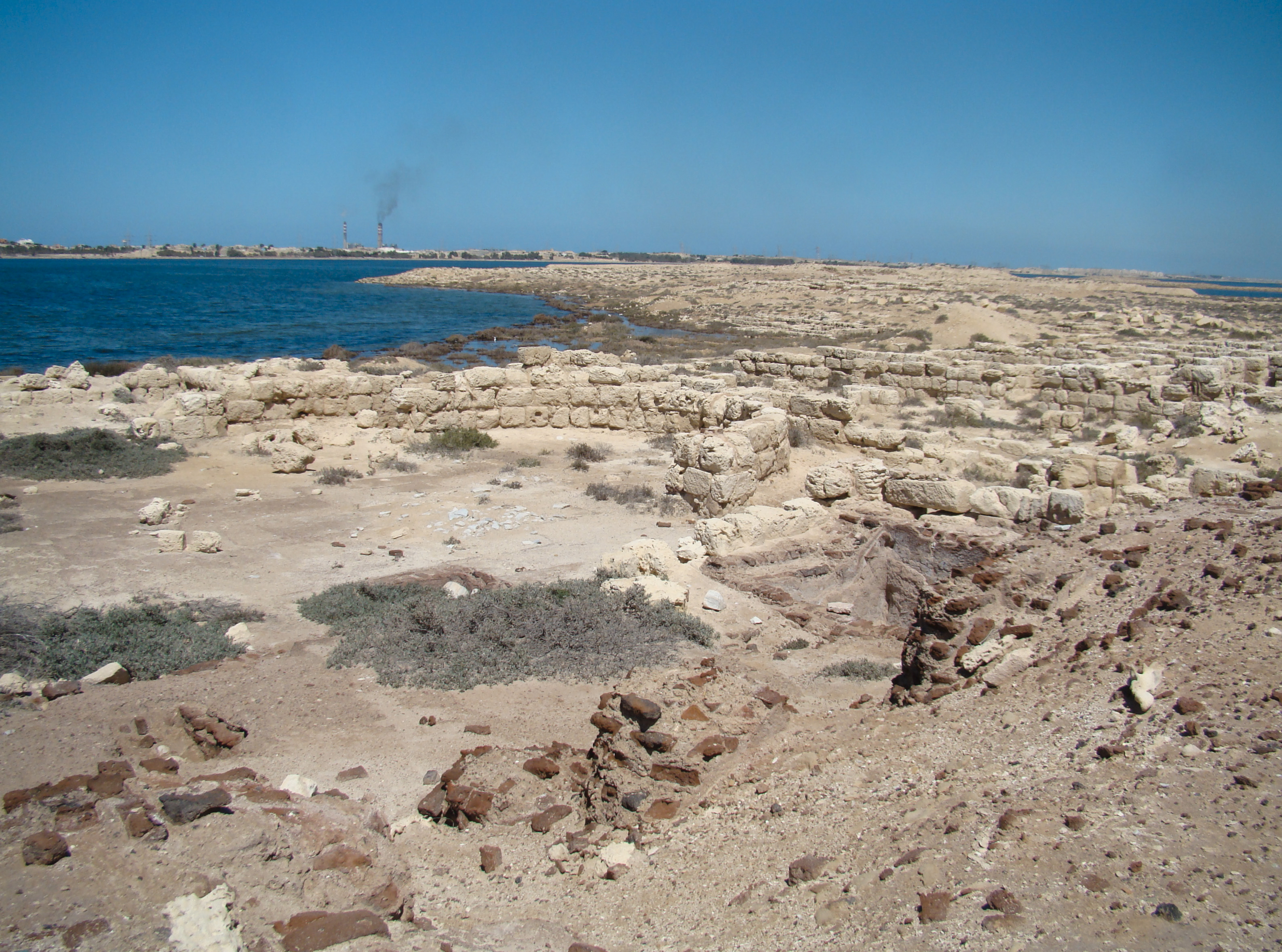 Ruines de la cité portuaire de Marea